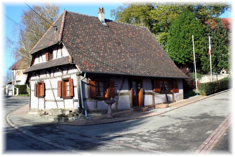 D Mairie vo Owermorschwíller